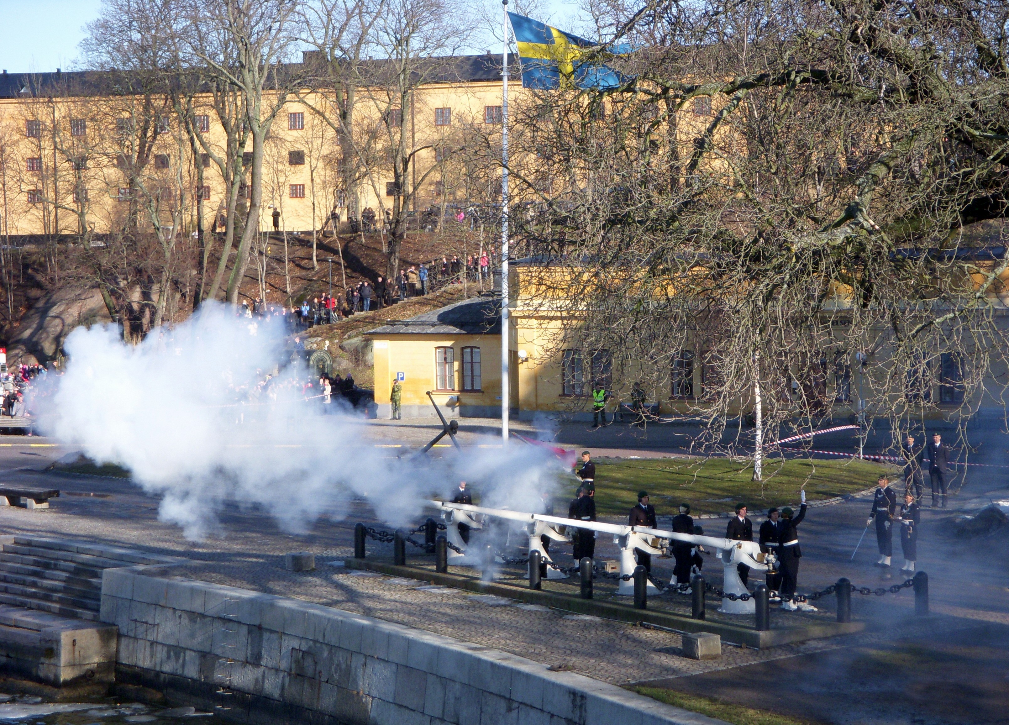 Salut från Skeppsholmen, Prinsessan Estelle är född